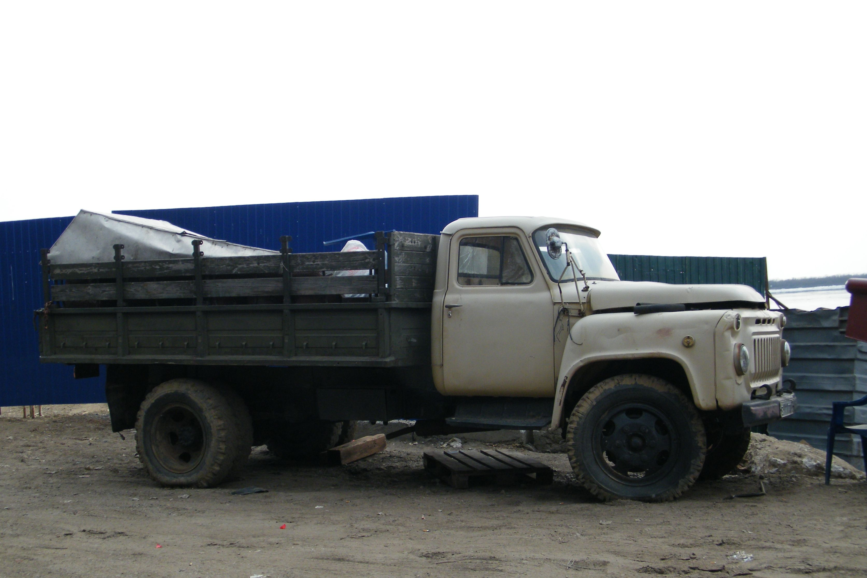 ГАЗ-52